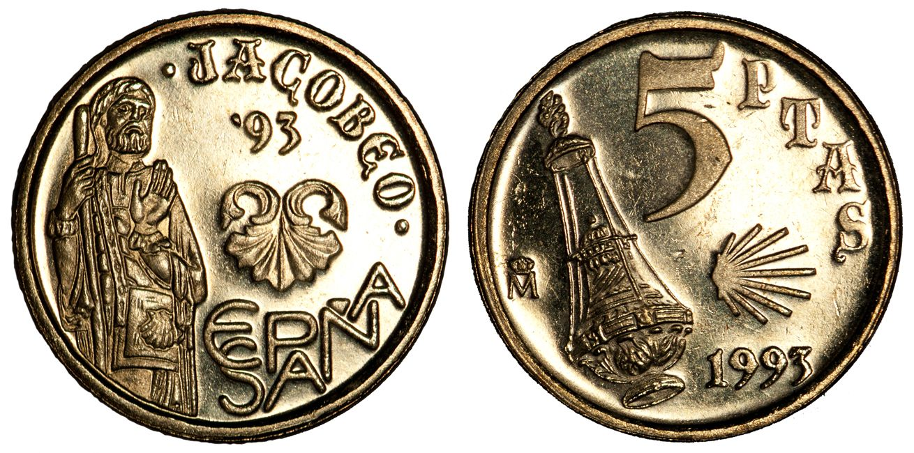 Cinco Pesetas 1993